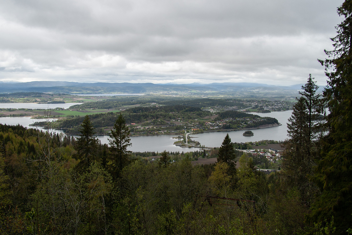 Dronningens utsikt ved Krokkleiva.